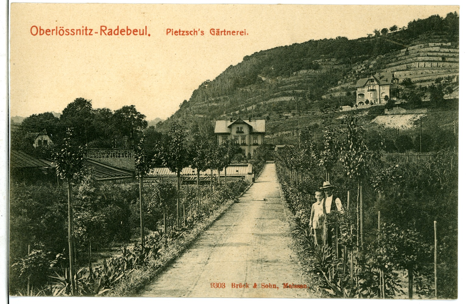 Radebeul; Pietzschs Gärtnerei This postcard is from publisher Brück & Sohn in Meißen ( postcard has a unique number 09303 and is available in a higher resolution at the publisher. This images was uploaded in a cooperation project between Wikipedians and the publisher.